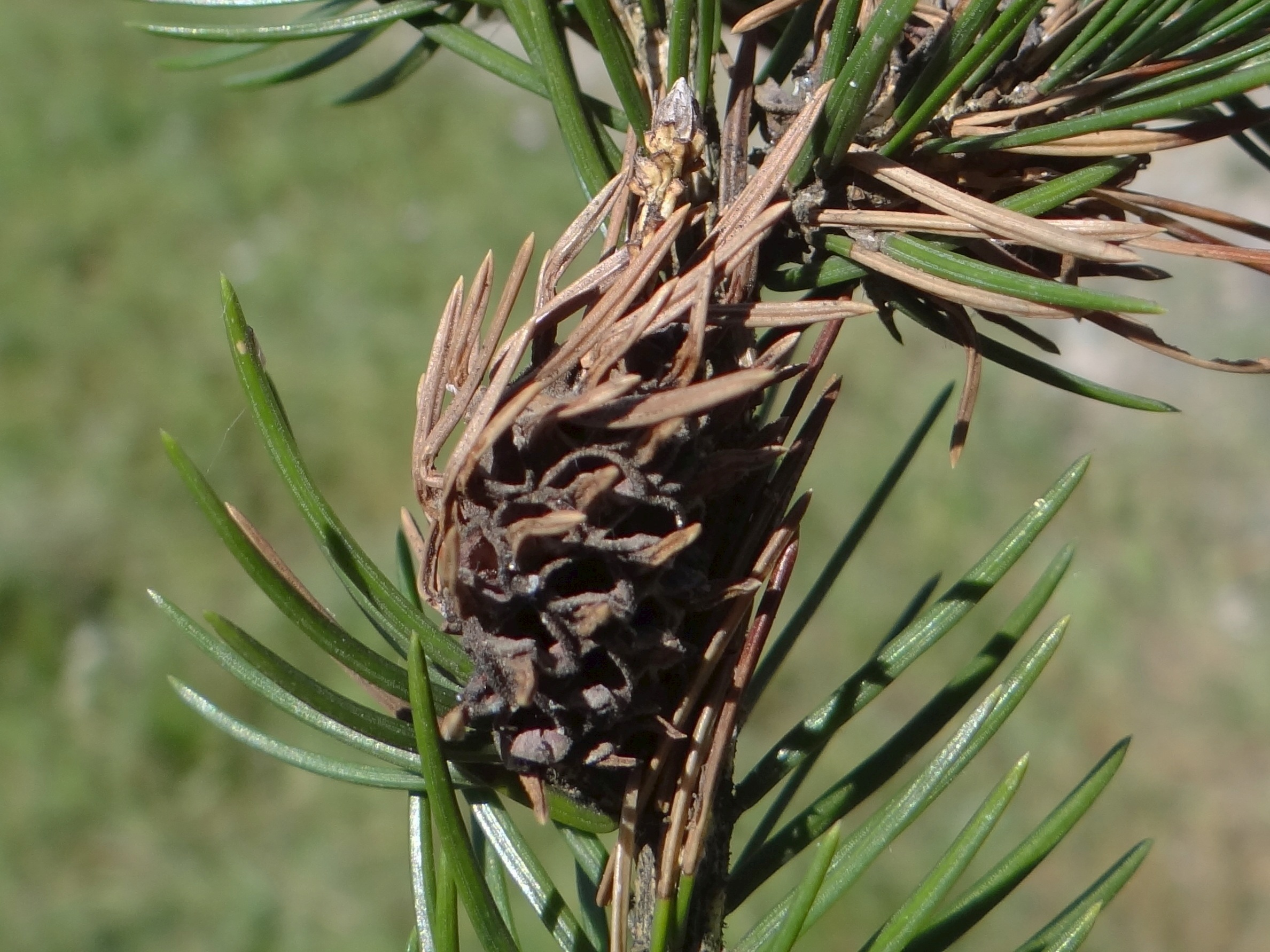 Adelges laricis on Picea abies. Location: Poland, Bębło